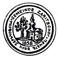 Печать села Заречово (Закарпатье)